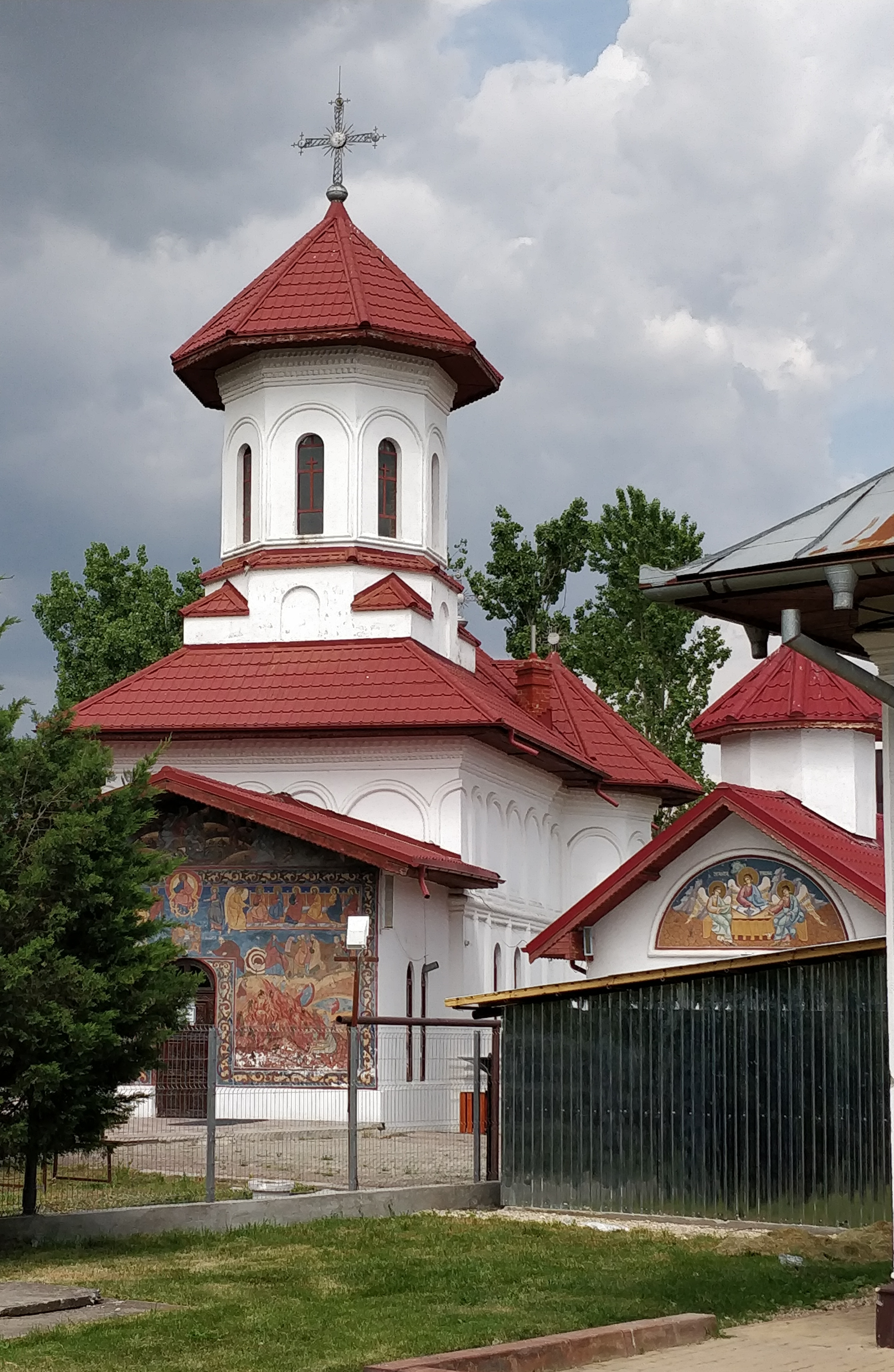 Biserica „Sf. Treime”